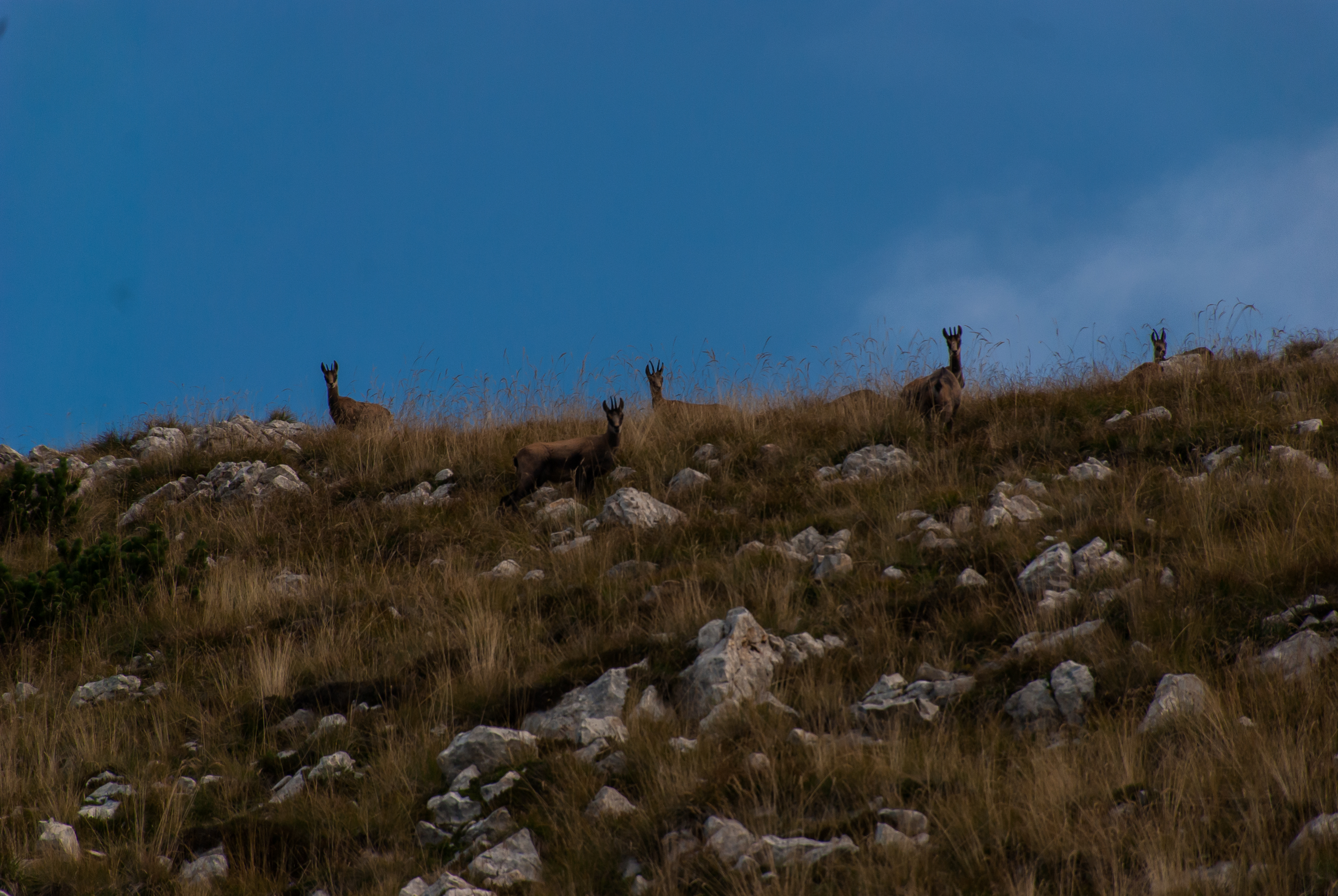 Camosci presso il rifugio "Telegrafo" - Parco naturale del Monte Baldo (Italy)